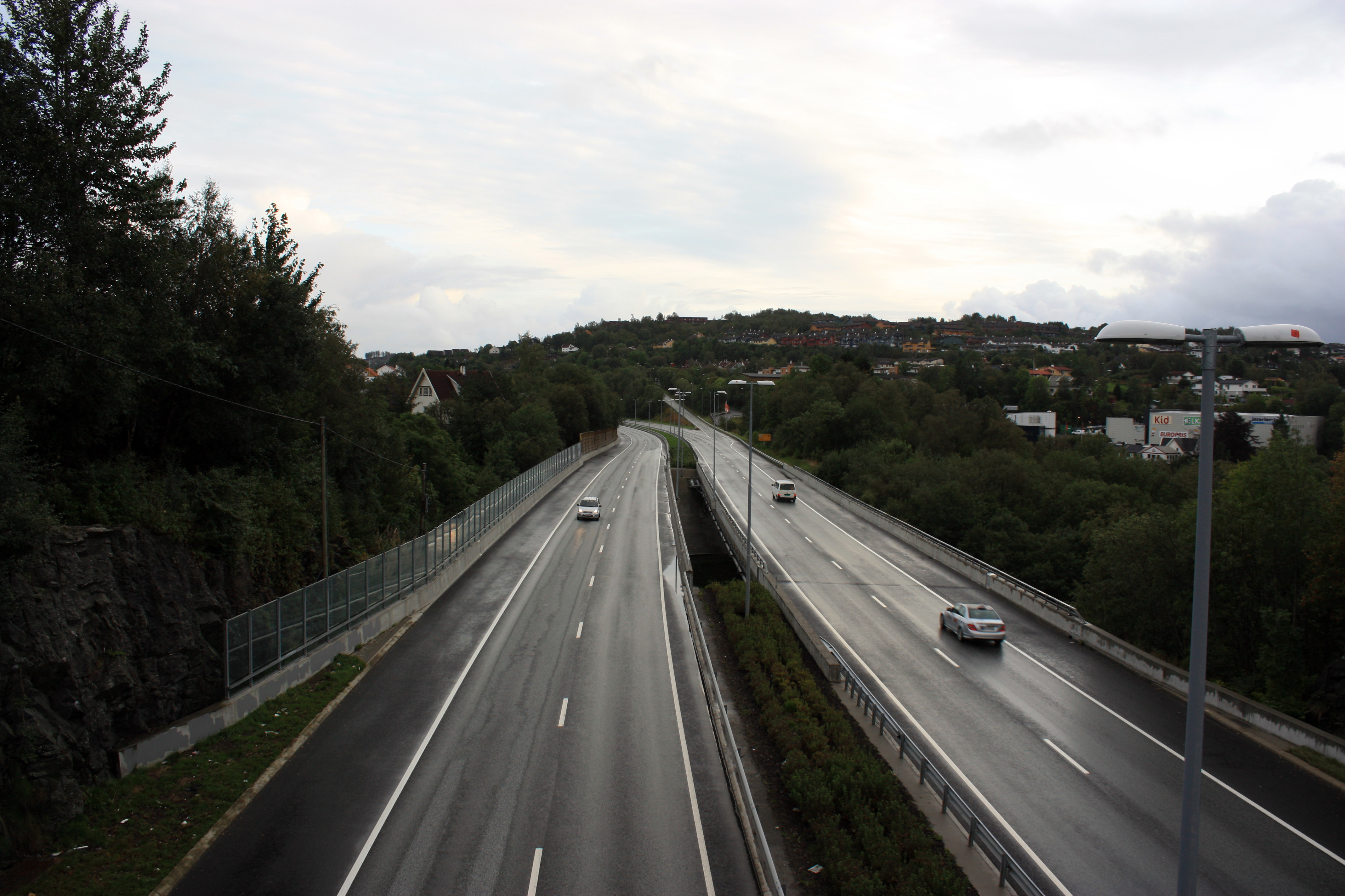 Fritz C. Riebers veg, Fana, Bergen.